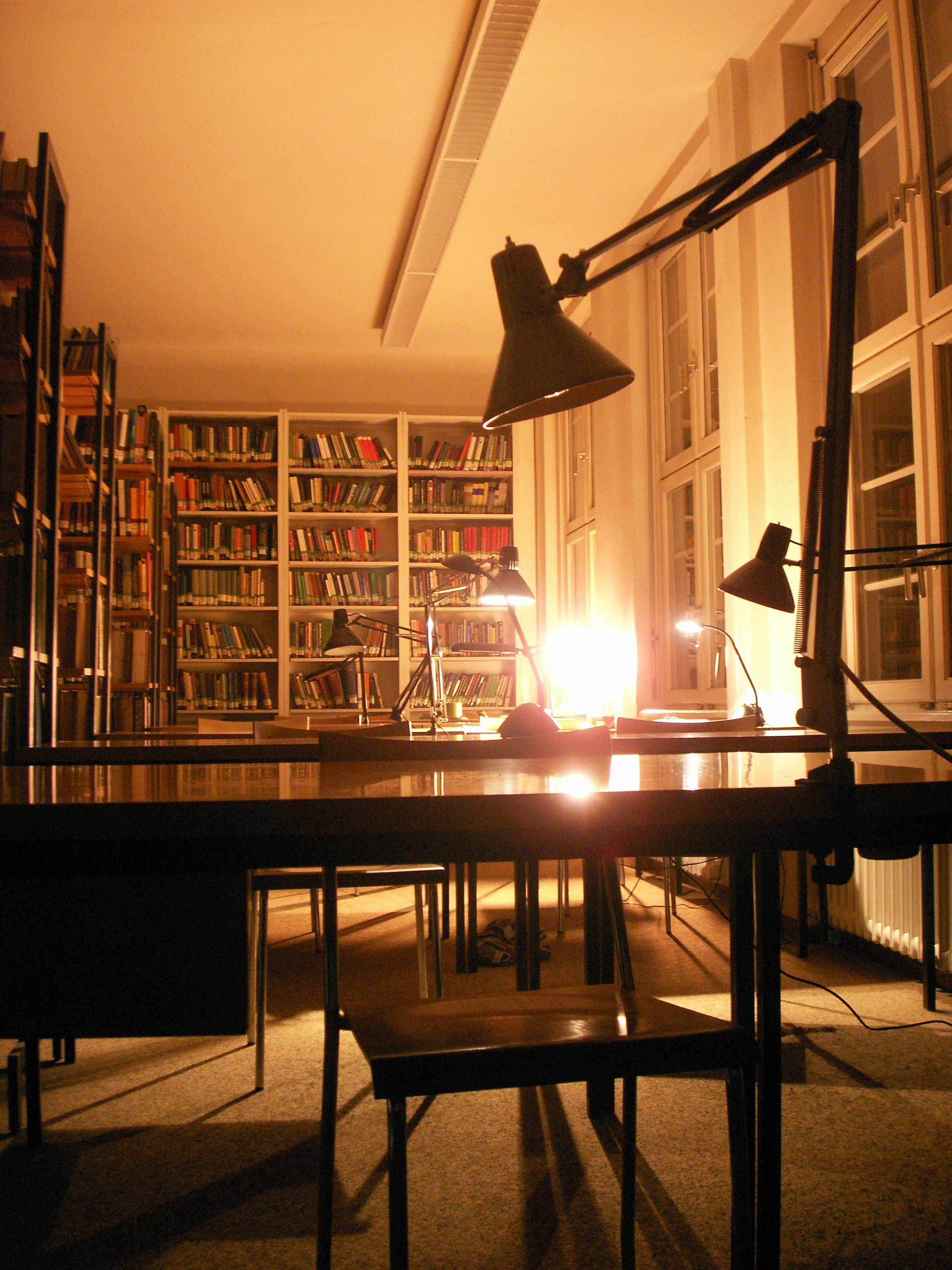 Bibliothek des Philosophischen Seminars der Ruprecht-Karls-Universität Heidelberg. Bücher.